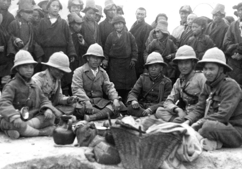 Lhasa, die Neujahrsparade des modernen Militärs vor dem Potala